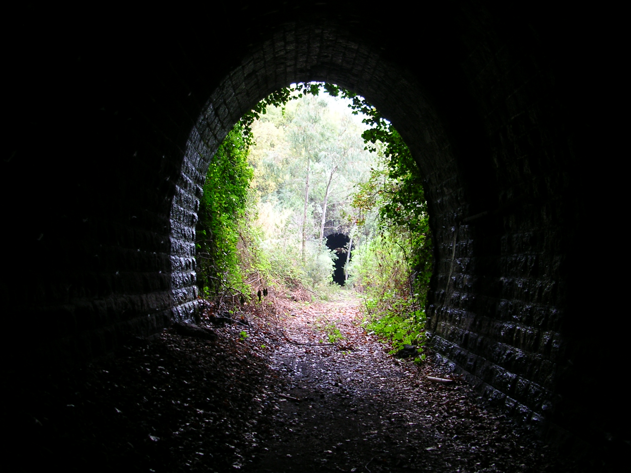 Vecchio tracciato della ferrovia Messina-Catania-Siracusa sulla Timpa di Acireale